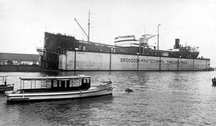 Repronegatief. M.S. Pegasus uit Zweden in het dok van de haven van Trandong Priok, Batavia.